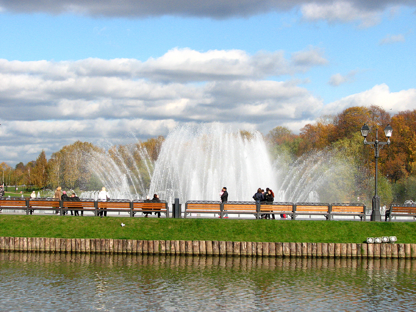 Фонтан на Среднем Царицынском пруду